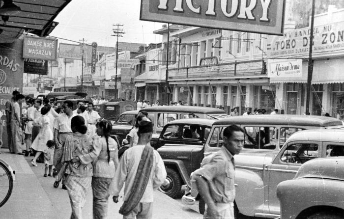 Repronegatief. Pasar Baroe te Djakarta